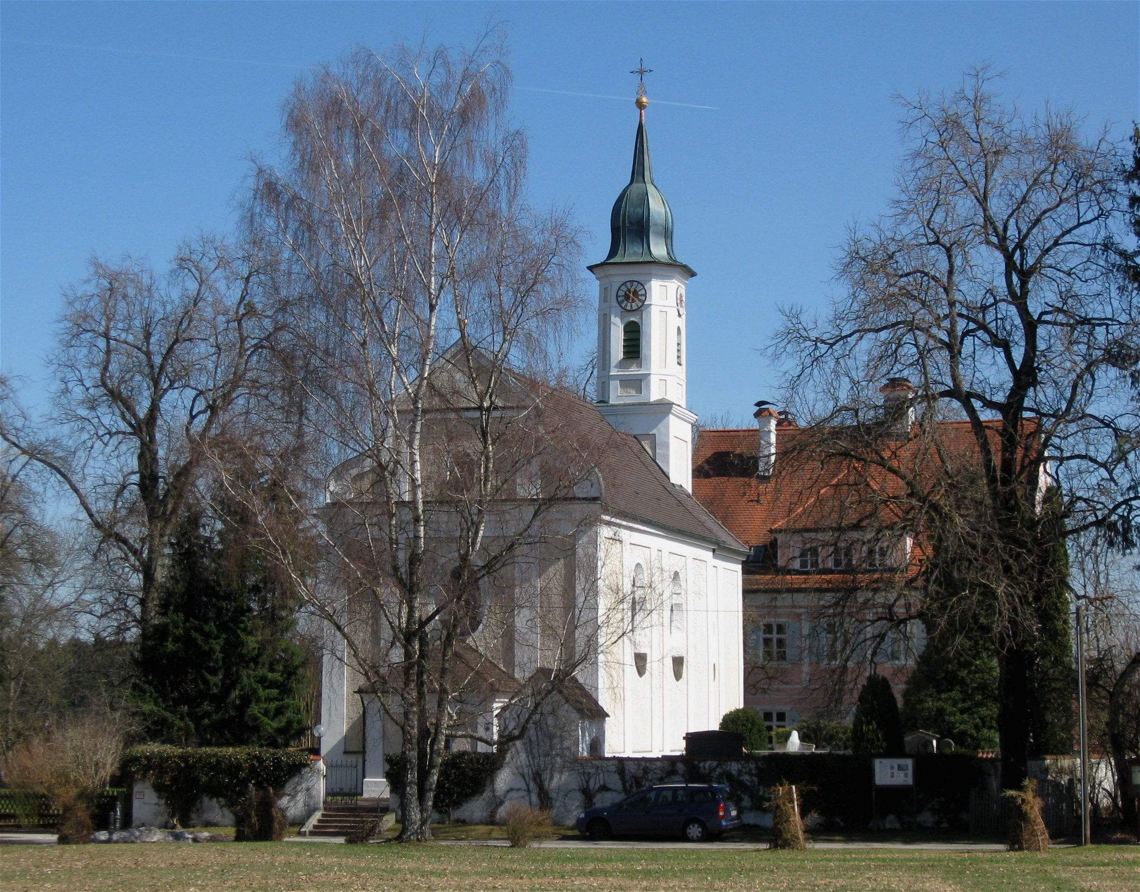 Oberhaching; Kreuzpullach; Wallfahrtskirche Hl. Kreuz, barocker Neubau 1710 von Philipp KöglspergerHaus Nr. 5; Ehem. Benefiziatenhaus, barocker Satteldachbau, 1711